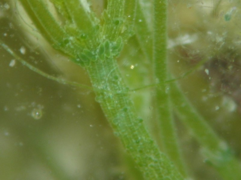 Gewöhnliche Armleuchteralge Chara vulgaris, Müritz-Gebiet